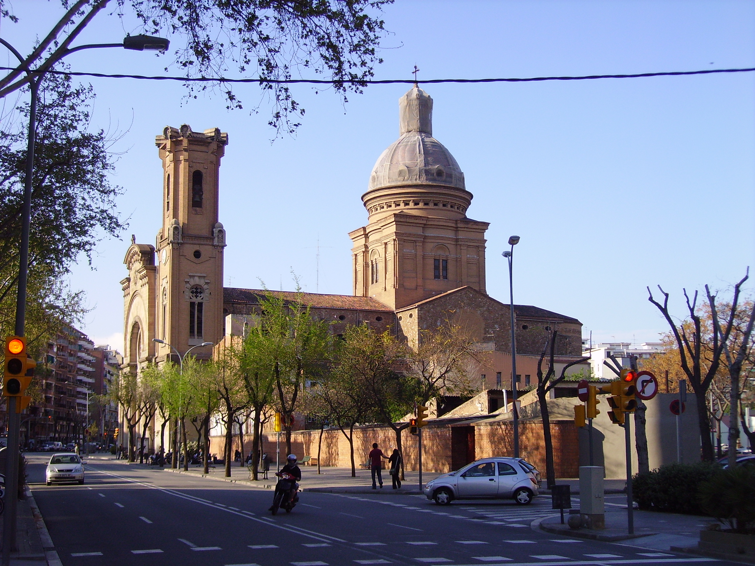 Església de Sant Andreu de Palomar a la Plaça Orfila, Barselona.